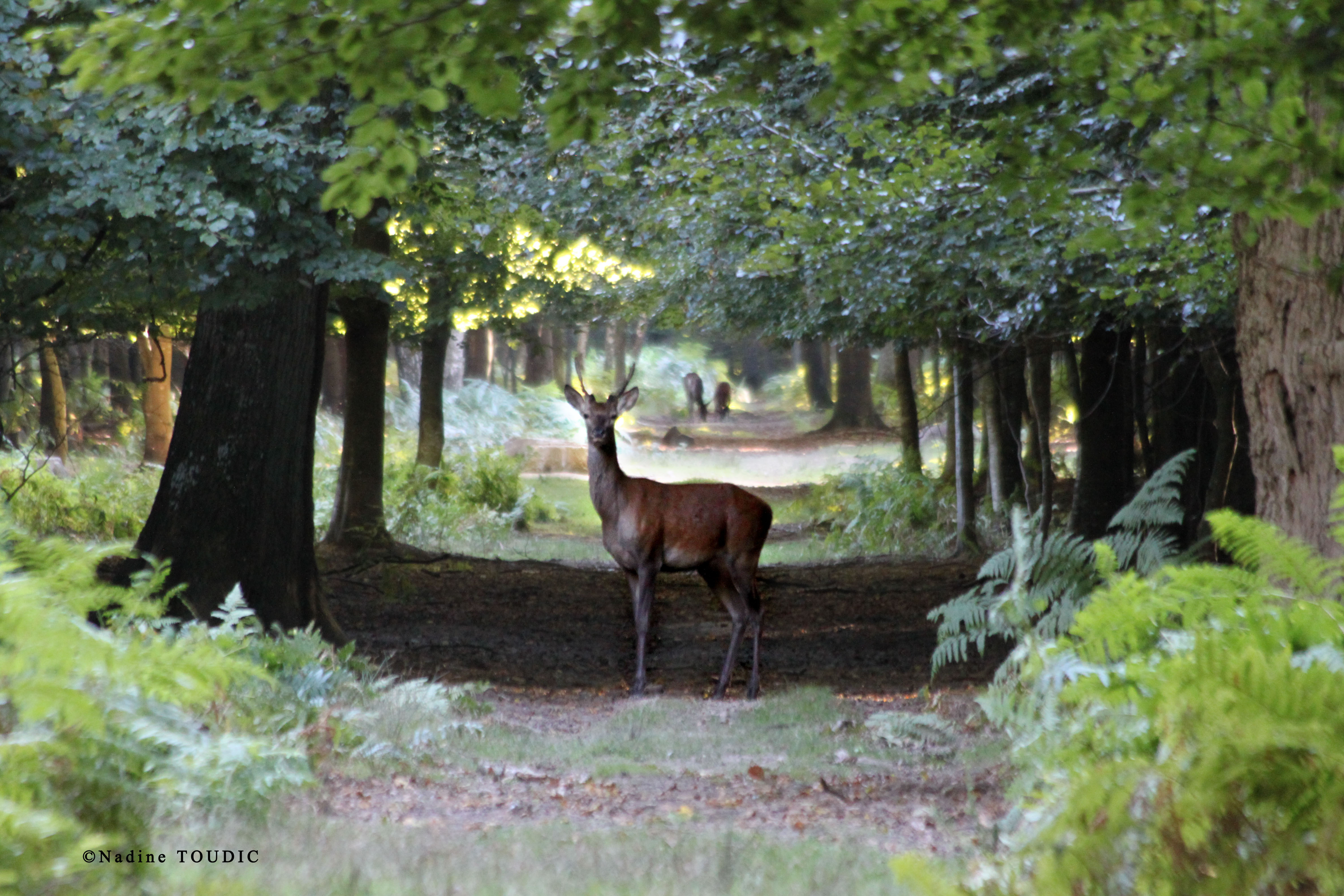 Jeune cerf avec sa première ramure.